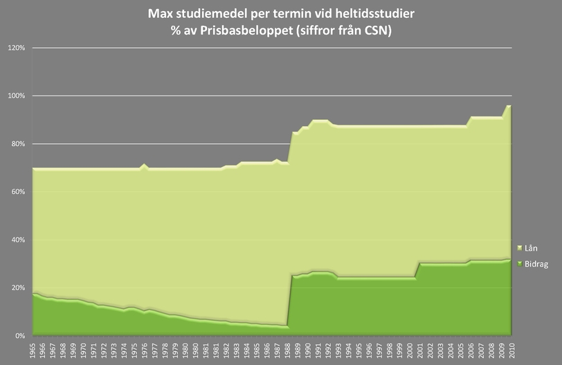 Diagram över hur studiemedlen i Sverige har utvecklats i förhållande till Prisbasbeloppet. Siffrorna kommer från csn.se.